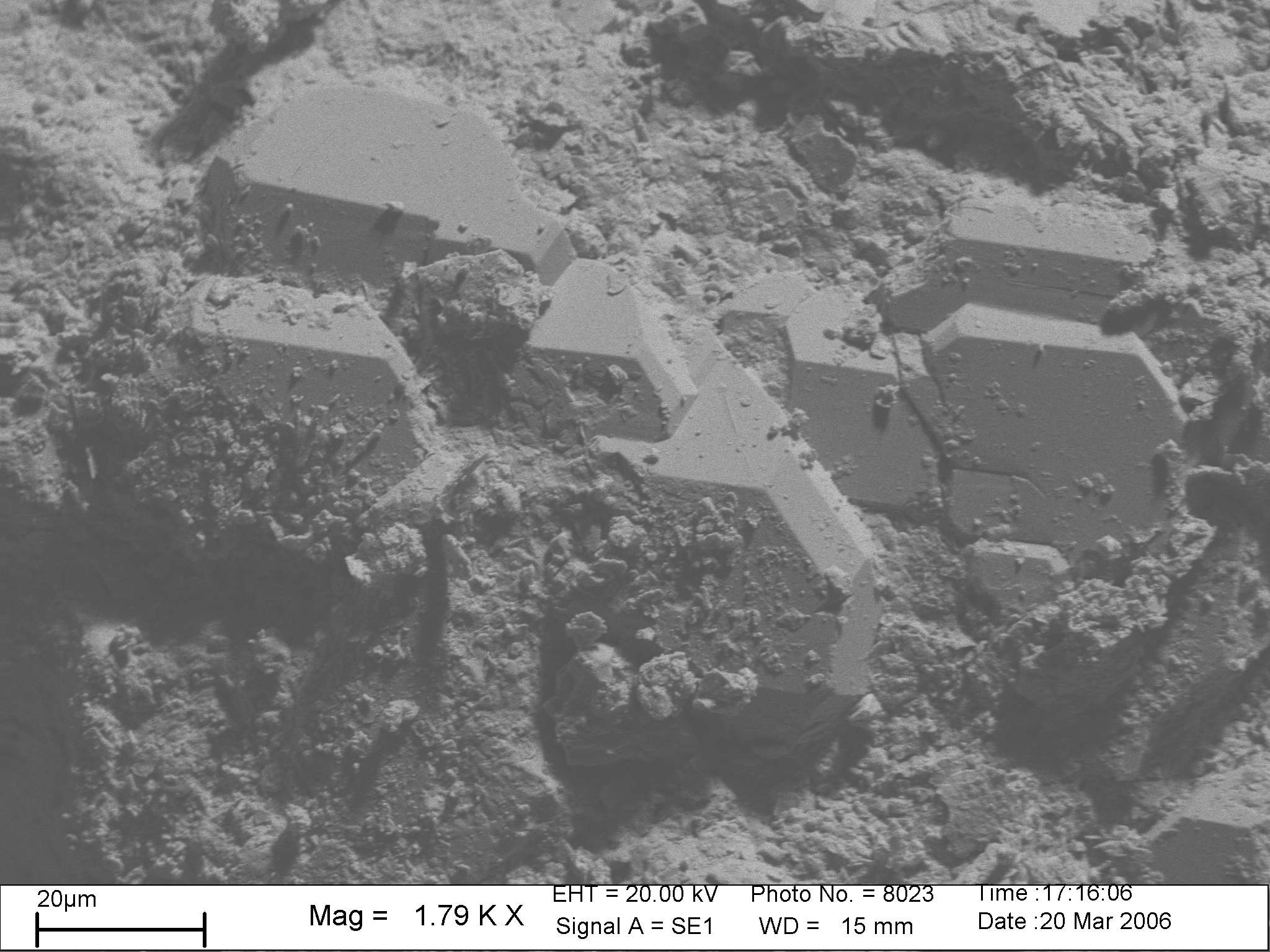 Neuwachstum von Quarz auf Sandkorn / new growth of quartz on sand. SEM image